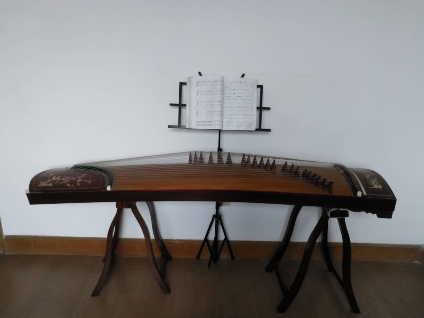 这是一张古筝的照片